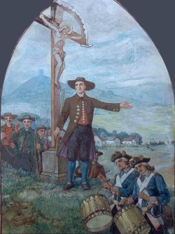 Wandgemälde in der Gellertkirche (Vršac), das die Täuschung der Türken durch Johann Jakob von Hennemann bei der Verteidigung von Werschetz zeigt.